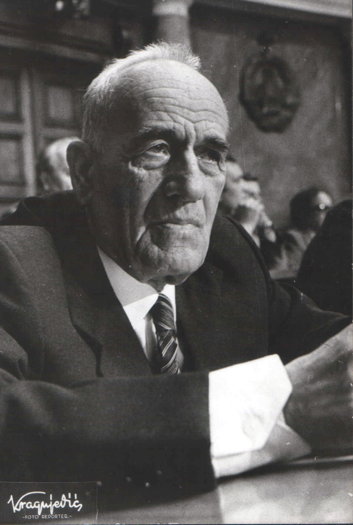 Mihailo Lalić (1914-1992)pisac.Foto:Stevan Kragujević (po odobrenju kćerke Tanje Kragujević)